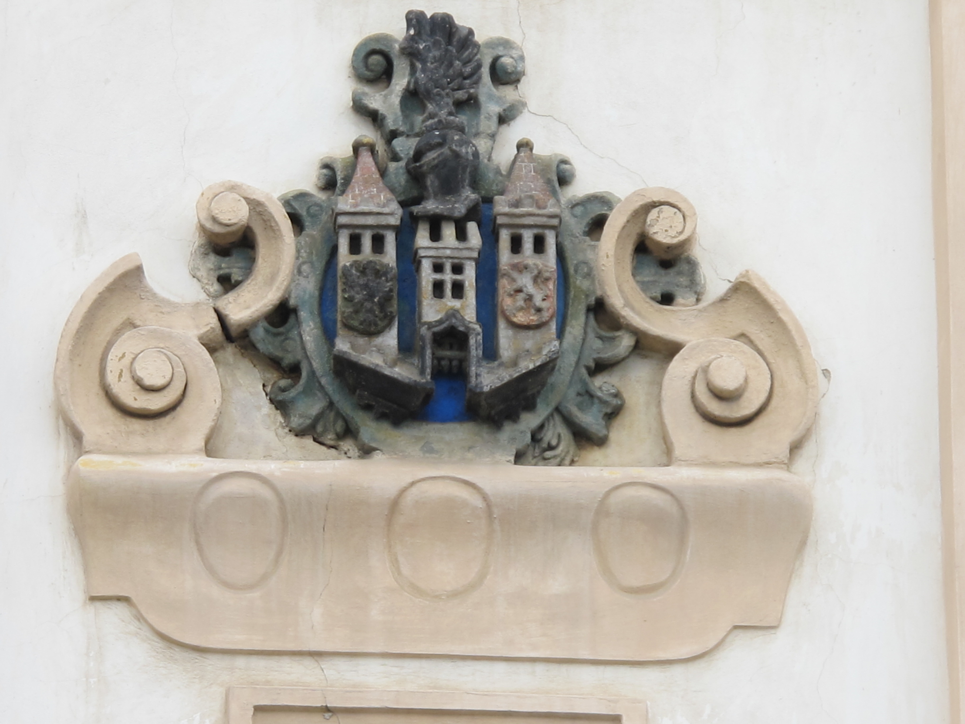 Znaky na budově radnice, Mírové náměstí 1, Kadaň. Znak města Kadaně.